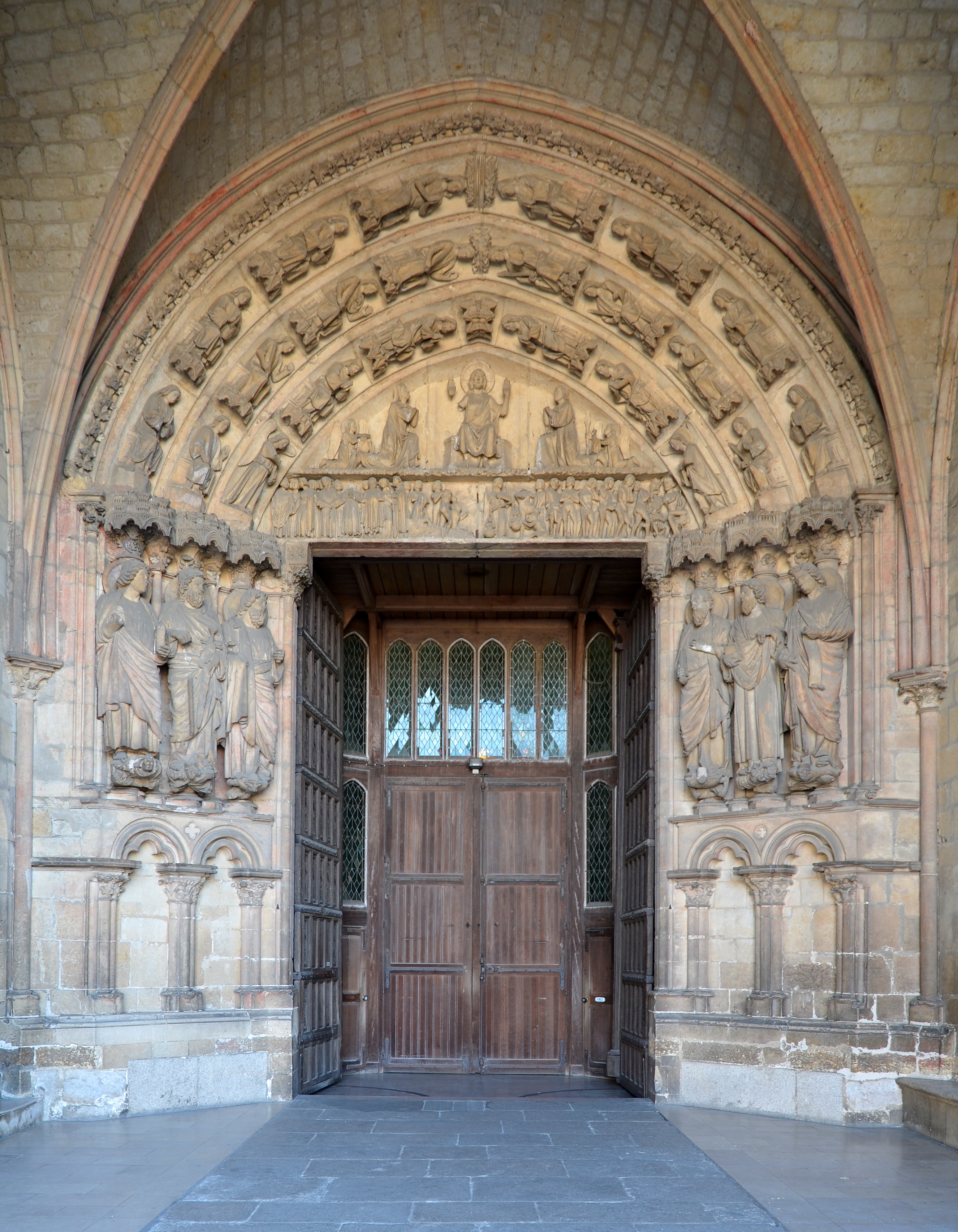 Église Notre-Dame de la Couture - Le Mans, Sarthe .